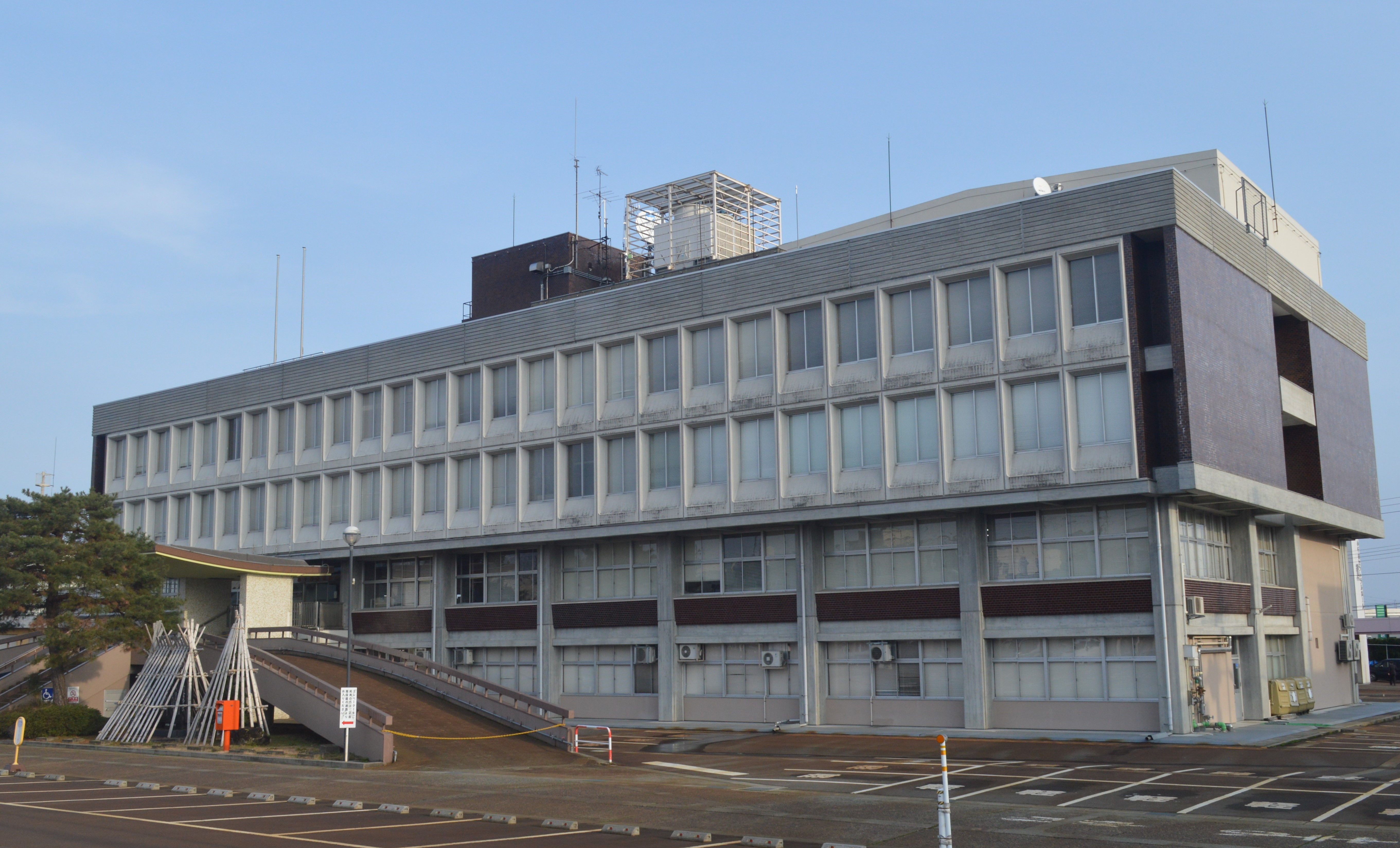 新潟県小千谷市城内2丁目7-5にある小千谷市役所。